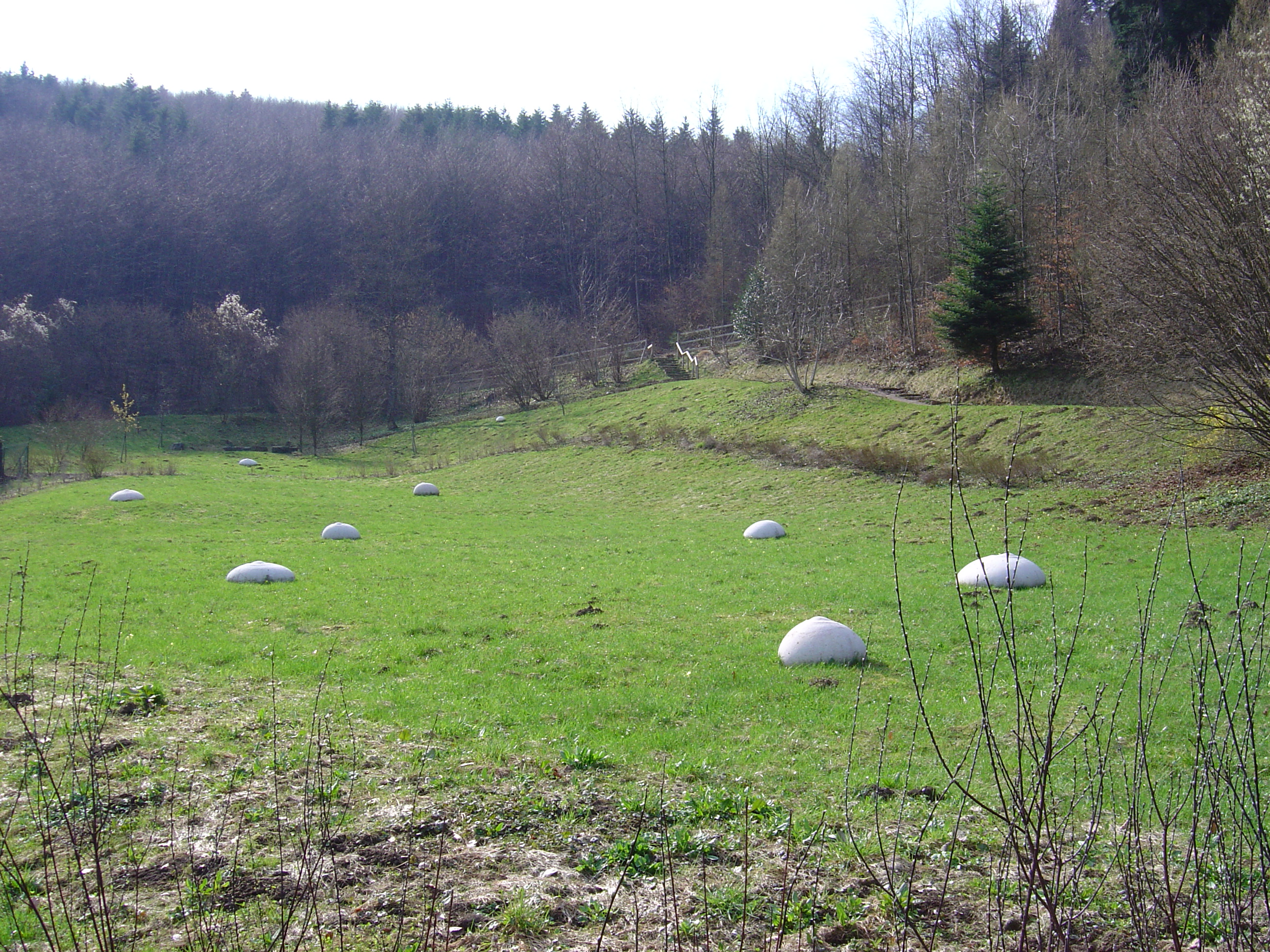 Source de l'Ill à Winkel (68). Aménagement paysager et touristique réalisé en 2001-2003 (Artiste : Anne Rochette ; Maîtrise d'ouvrage déléguée : SEMHA). --Jospe 2 août 2006 à 19:59 (CEST)